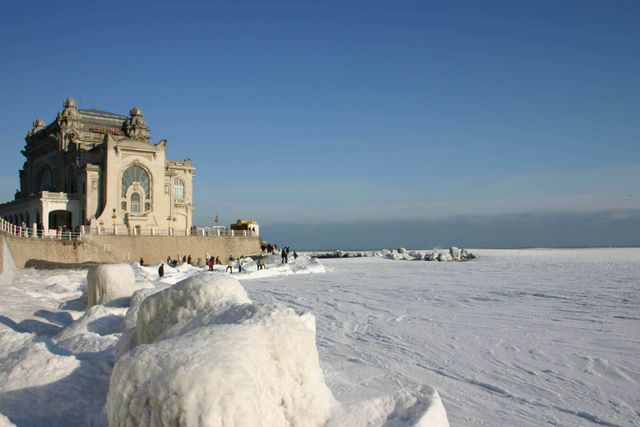 Constanza (Roumanie) l'hiver.